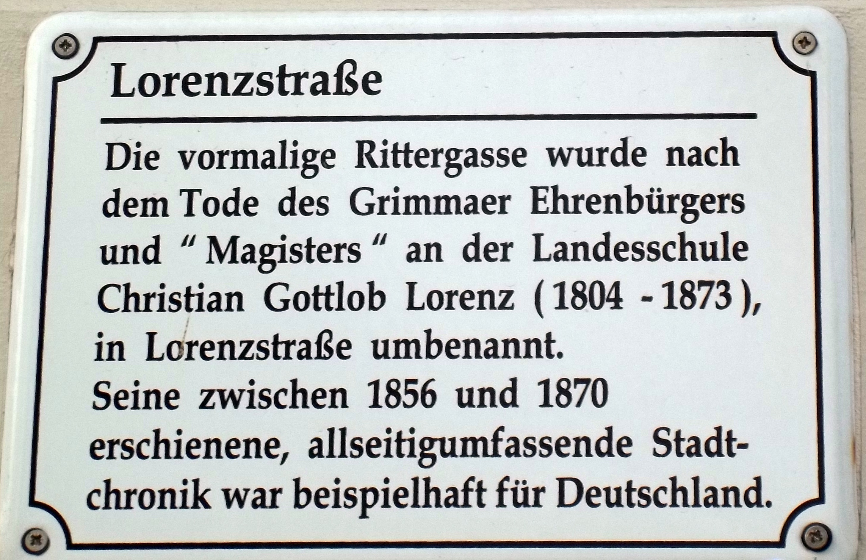 Informationstafel zu Gottlob Lorenz in der Lorenzstraße in Grimma - Foto: Holger Zürch